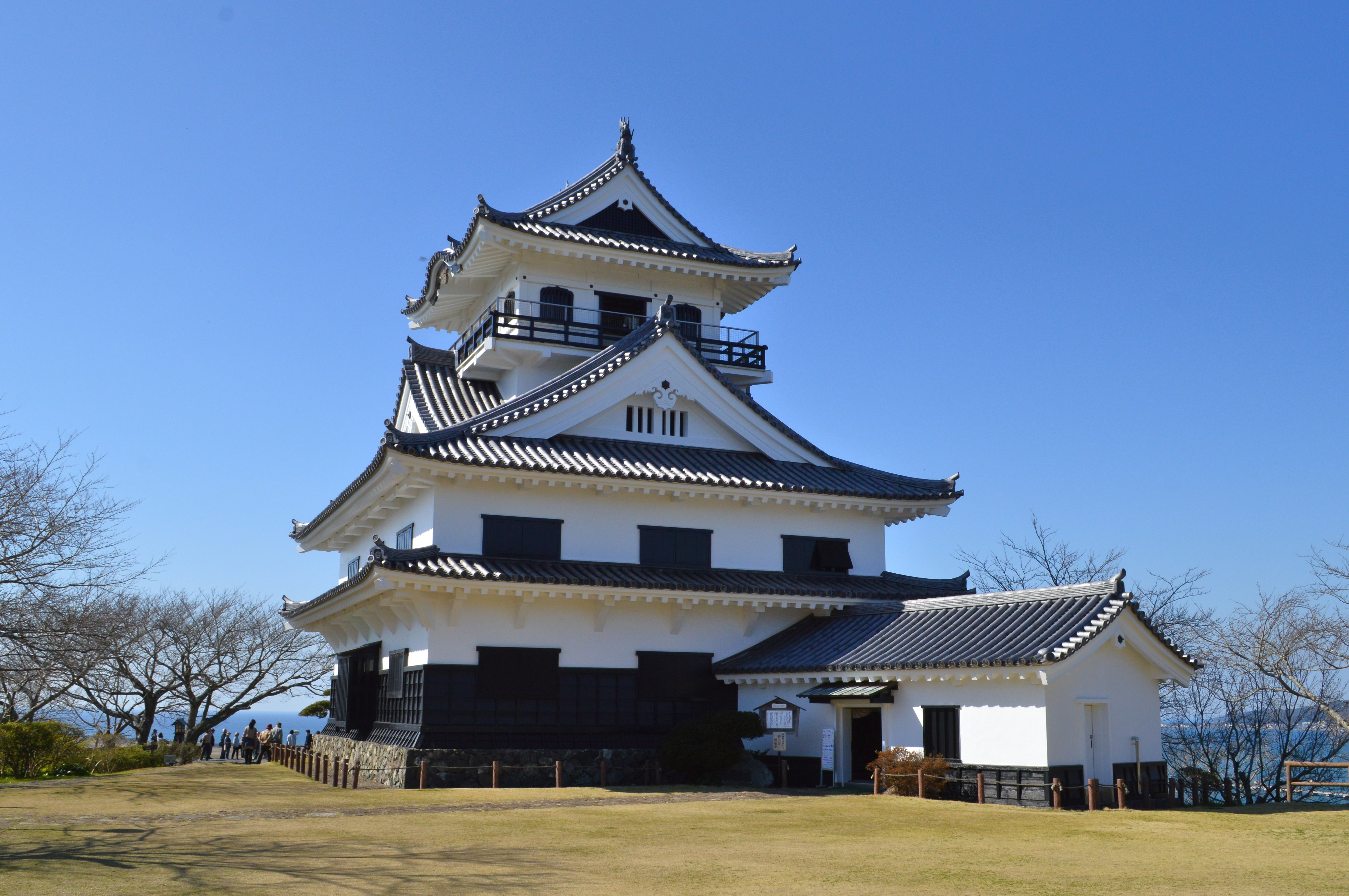 館山城 模擬天守